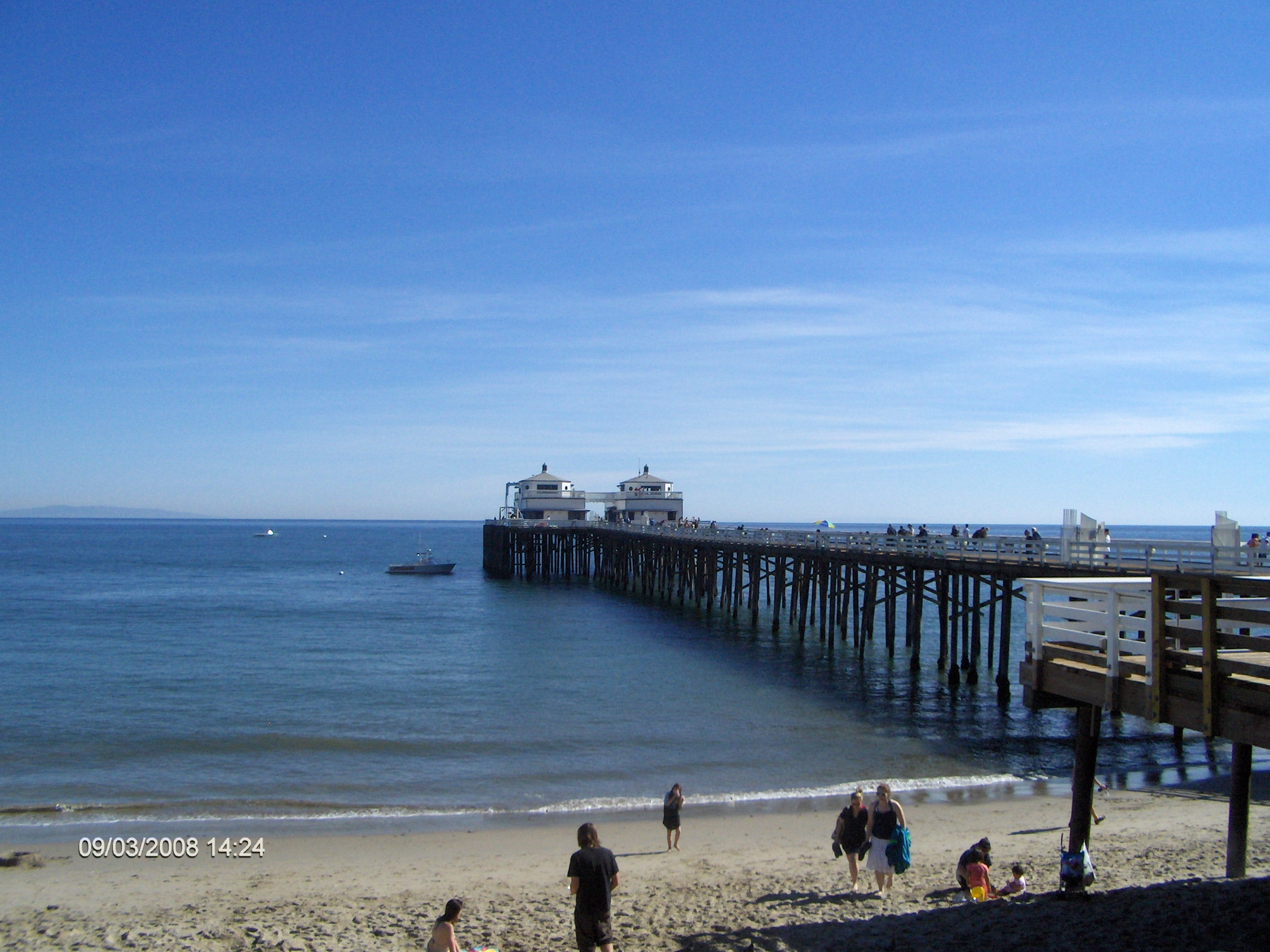 Zelf gemaakte foto van Malibu pier